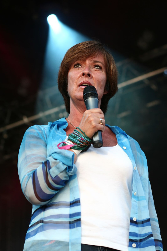 Mona Sahlin during Stockholm Pride 2007.